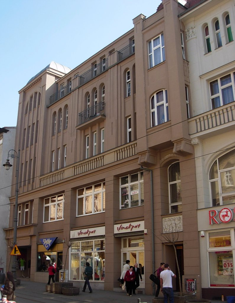 Kamienica ul. Gdańska 10 w Bydgoszczy